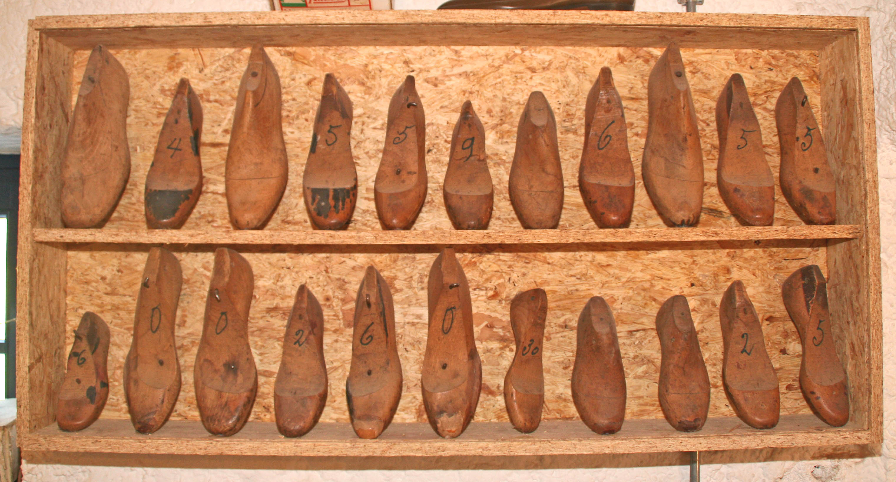 Leeschten.